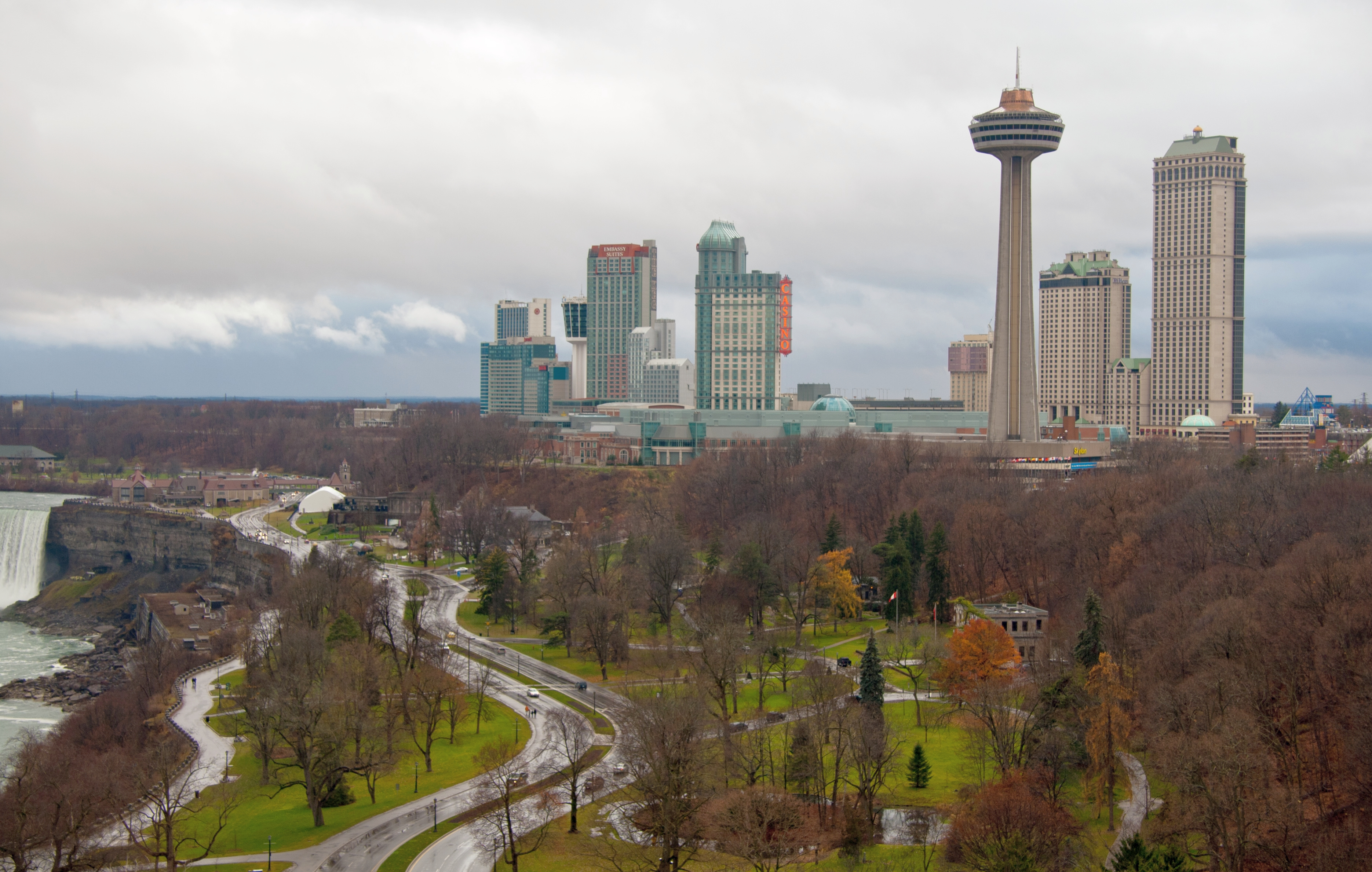 Niagara Falls, Ontario, skyline.